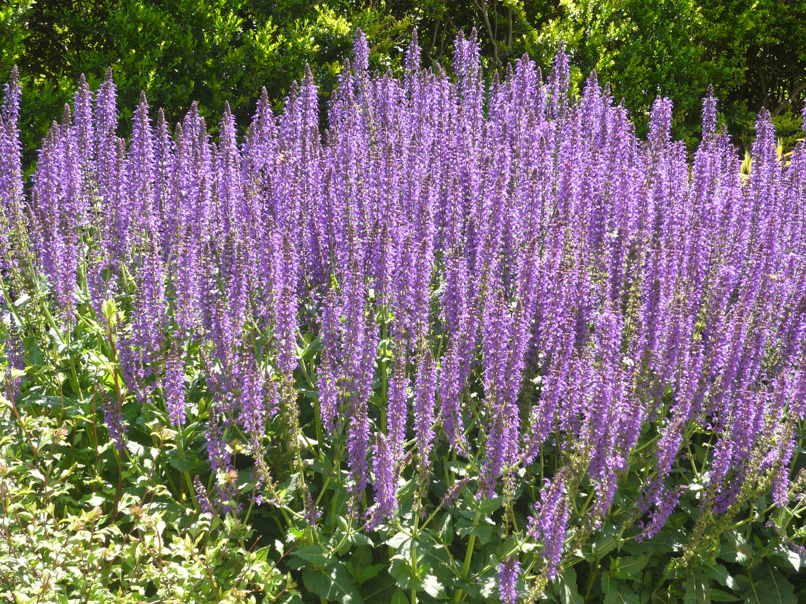 Salvia x sylvestris 'Mainacht'. Real Jardín Botánico de Madrid.